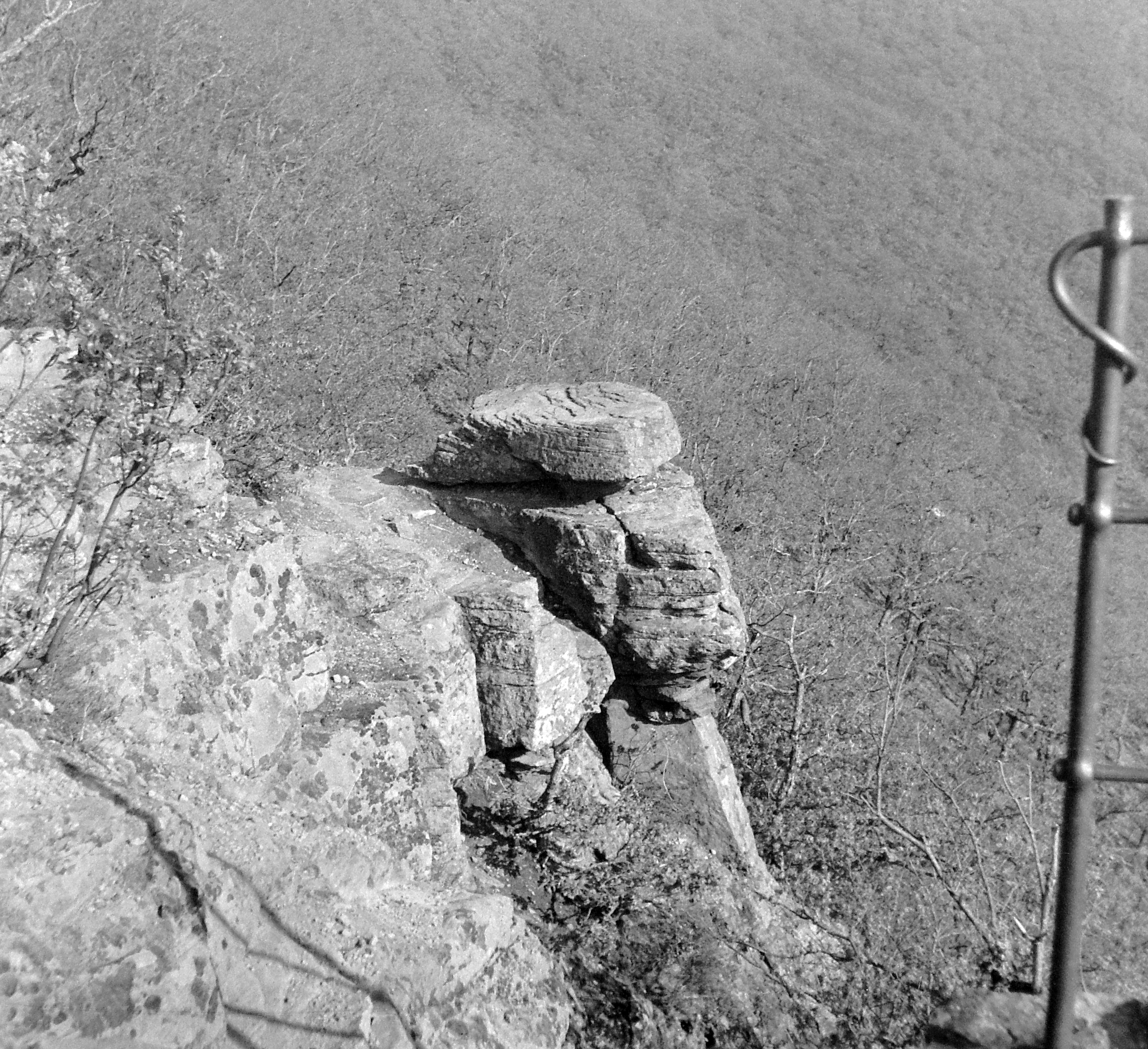 Zsongorkő. Location: Hungary Tags: rock Title: Zsongorkő.